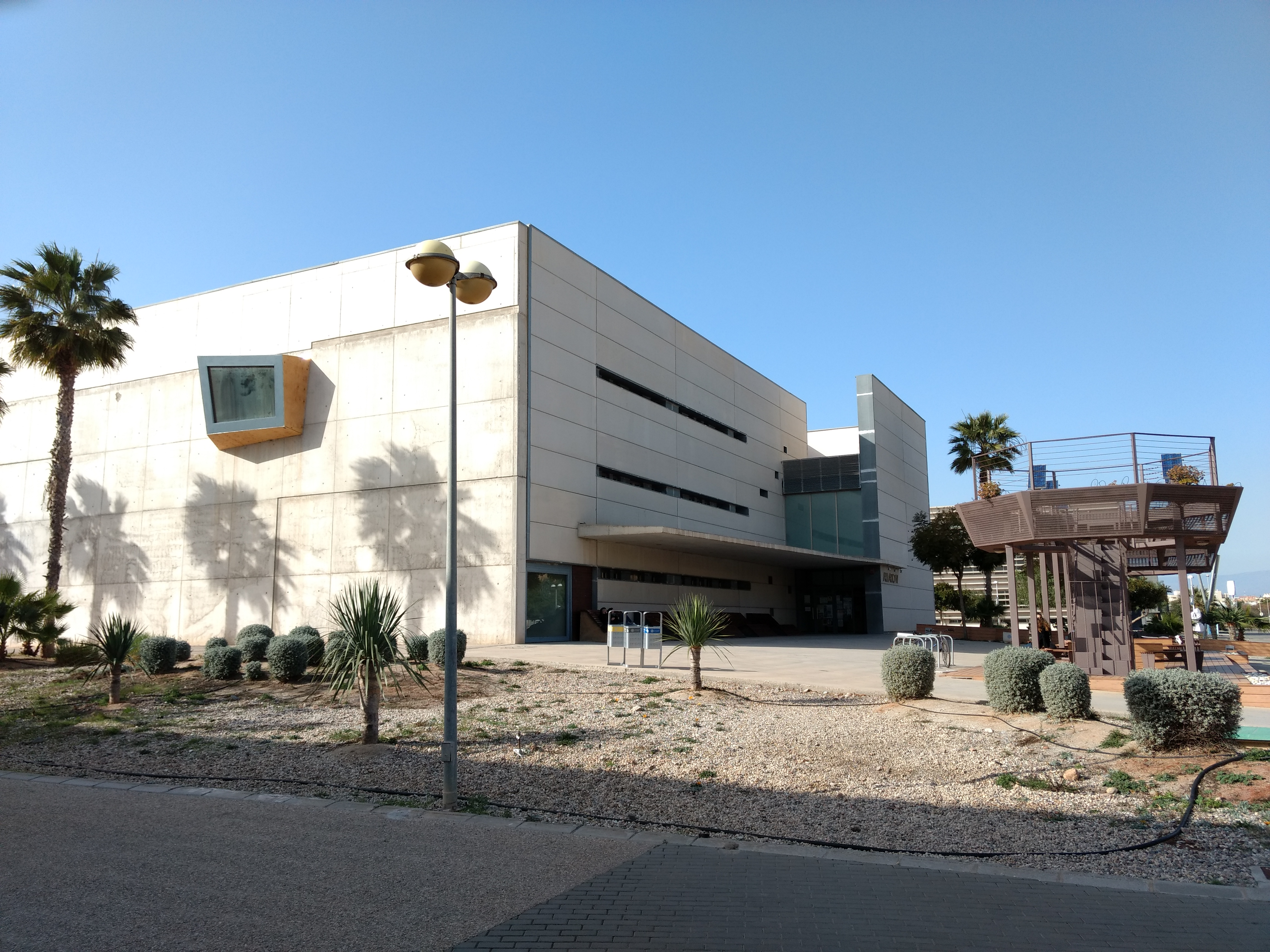 Edificio A-IV